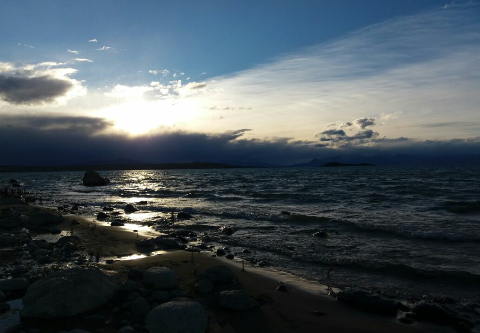 observando el hermoso atardecer.